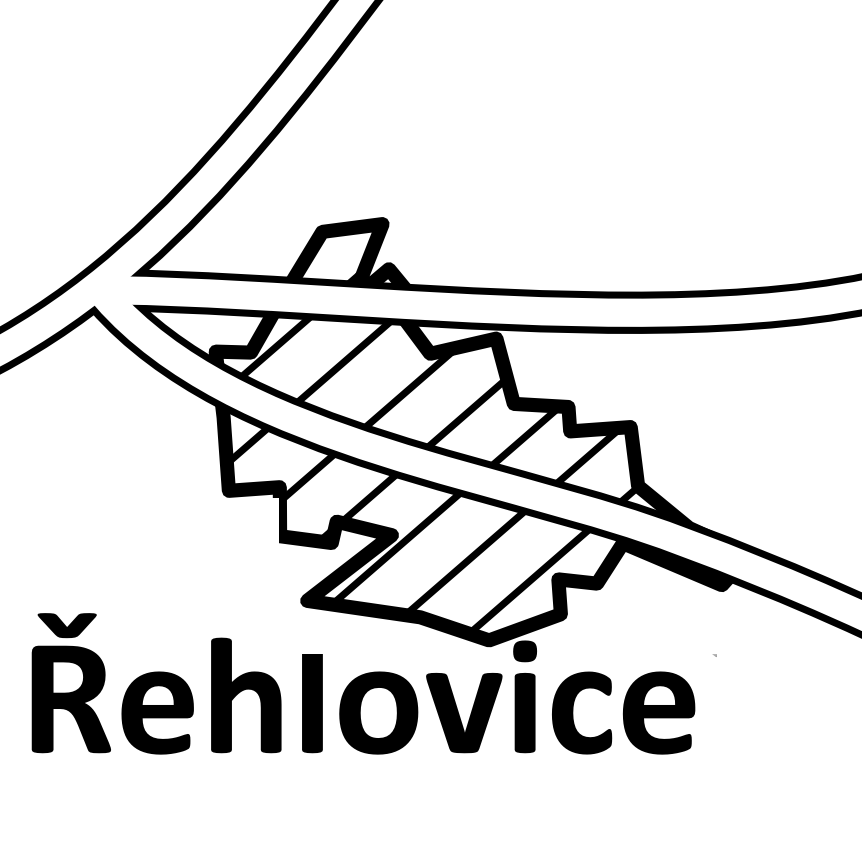 Intravilán (šrafovaně), ilustrace